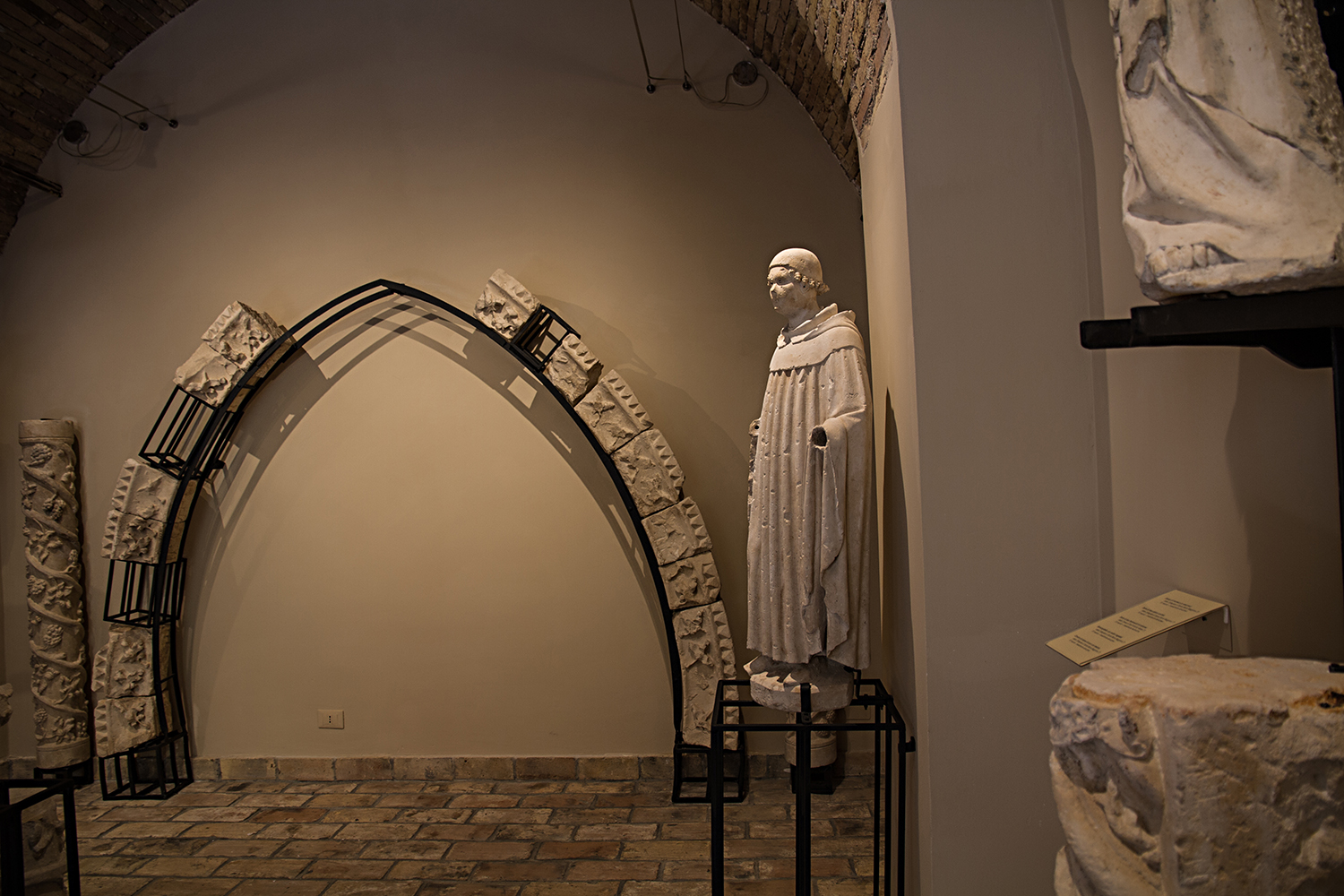 Antiquarium comunale This is a photo of a monument which is part of cultural heritage of Italy.